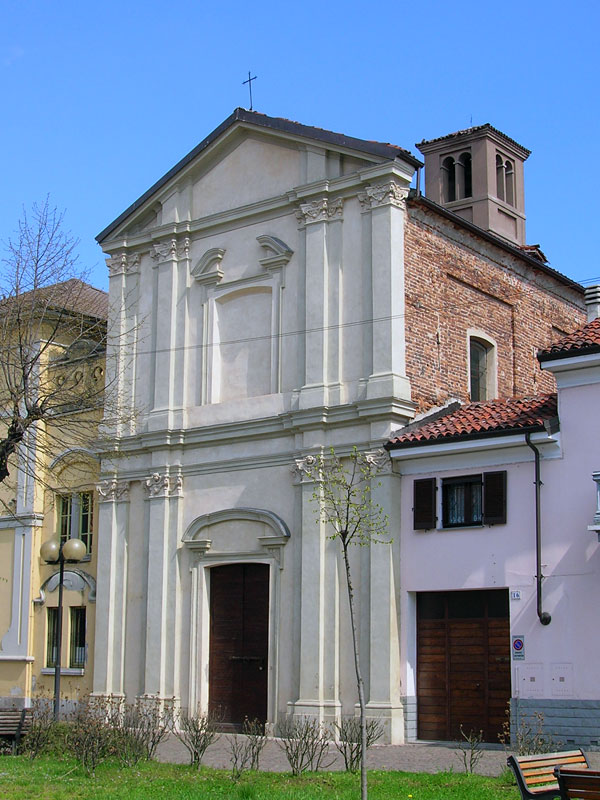 L'Oratorio della S.S. Trinità, ora Museo A.Malandra, di Vespolate foto by Alessandro Vecchi - 2006